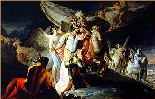 Aníbal vencedor contempla por primera vez Italia desde los Alpes